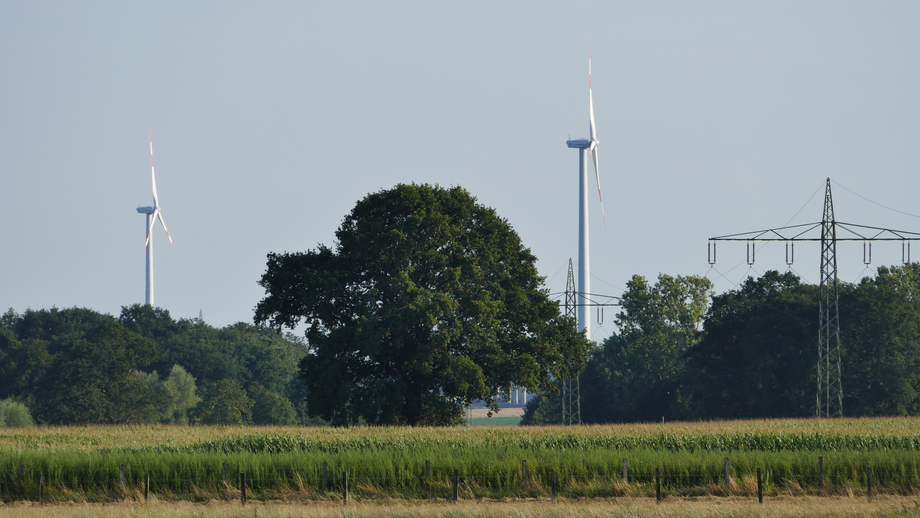 Freistehende Stieleiche auf einem Feld nahe dem Eeckesweg Denkmalnummer ND 28 (Blick von der Harbecker Straße im Norden)